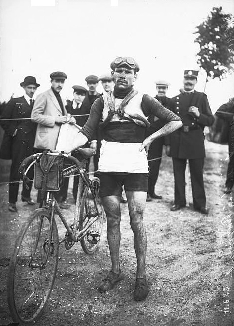 2 octobre 1910, Morin gagnant du "Lion rugissant" au Parc des Princes